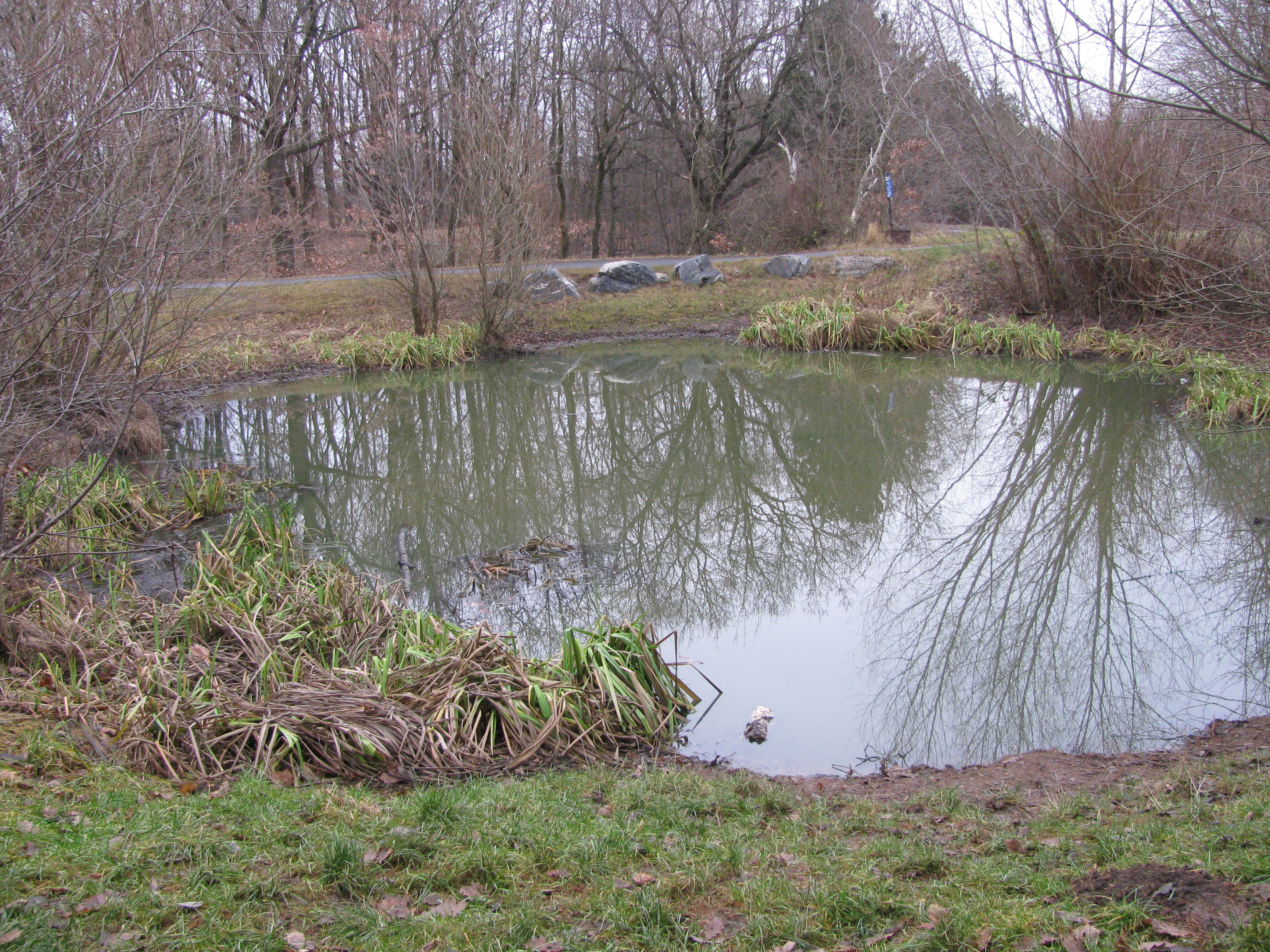 Mezi zajímavé biotopy patří několik tůněk.